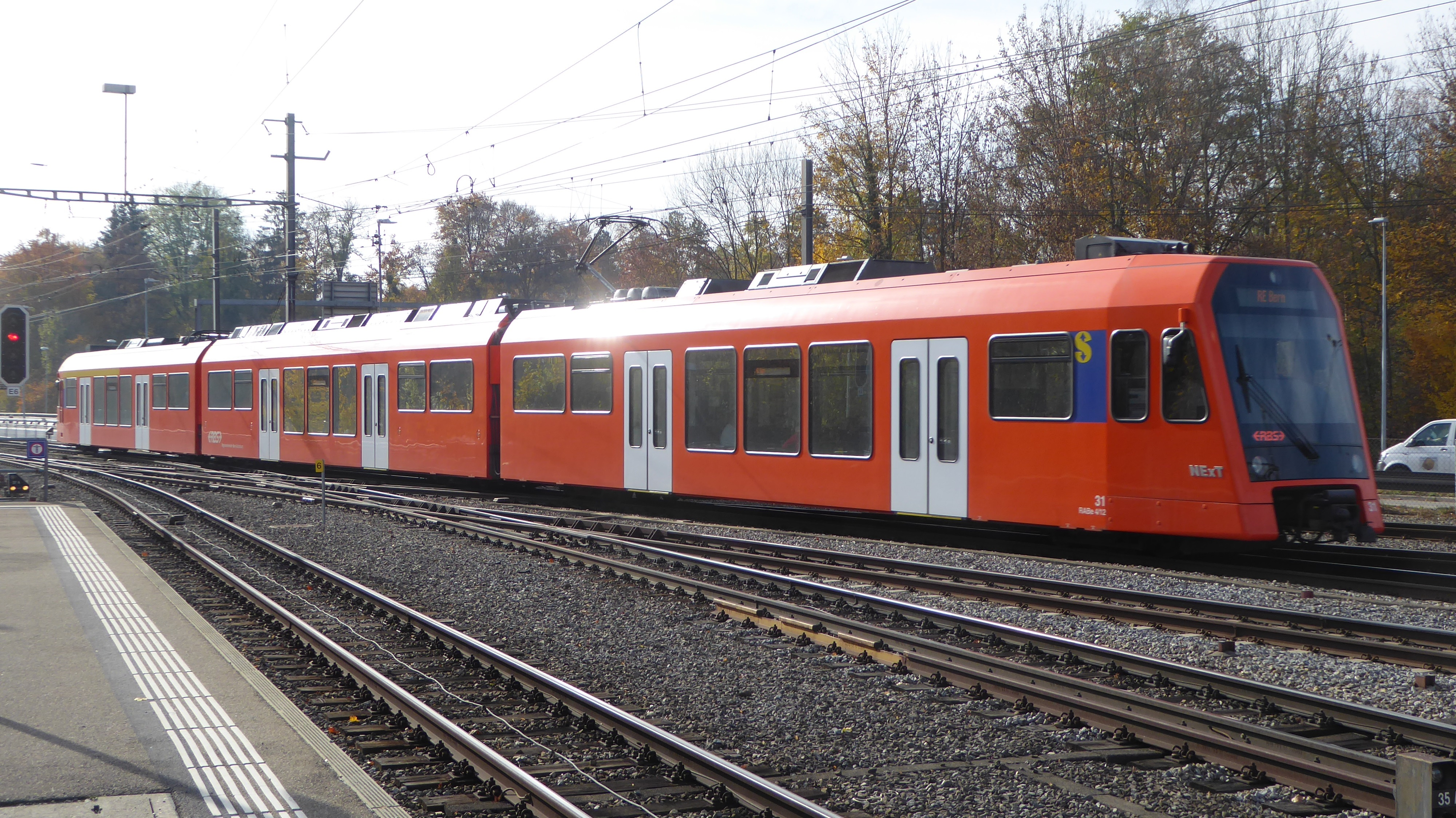 RABe 4/12 31 NExT des Regionalverkehrs Bern–Solothurn in Worblaufen